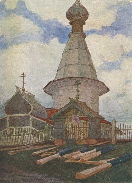 Церковь Николая Чудотворца в деревне Малошуйка, Архангельской губернии. Открытка Общества возрождения художественной Руси.